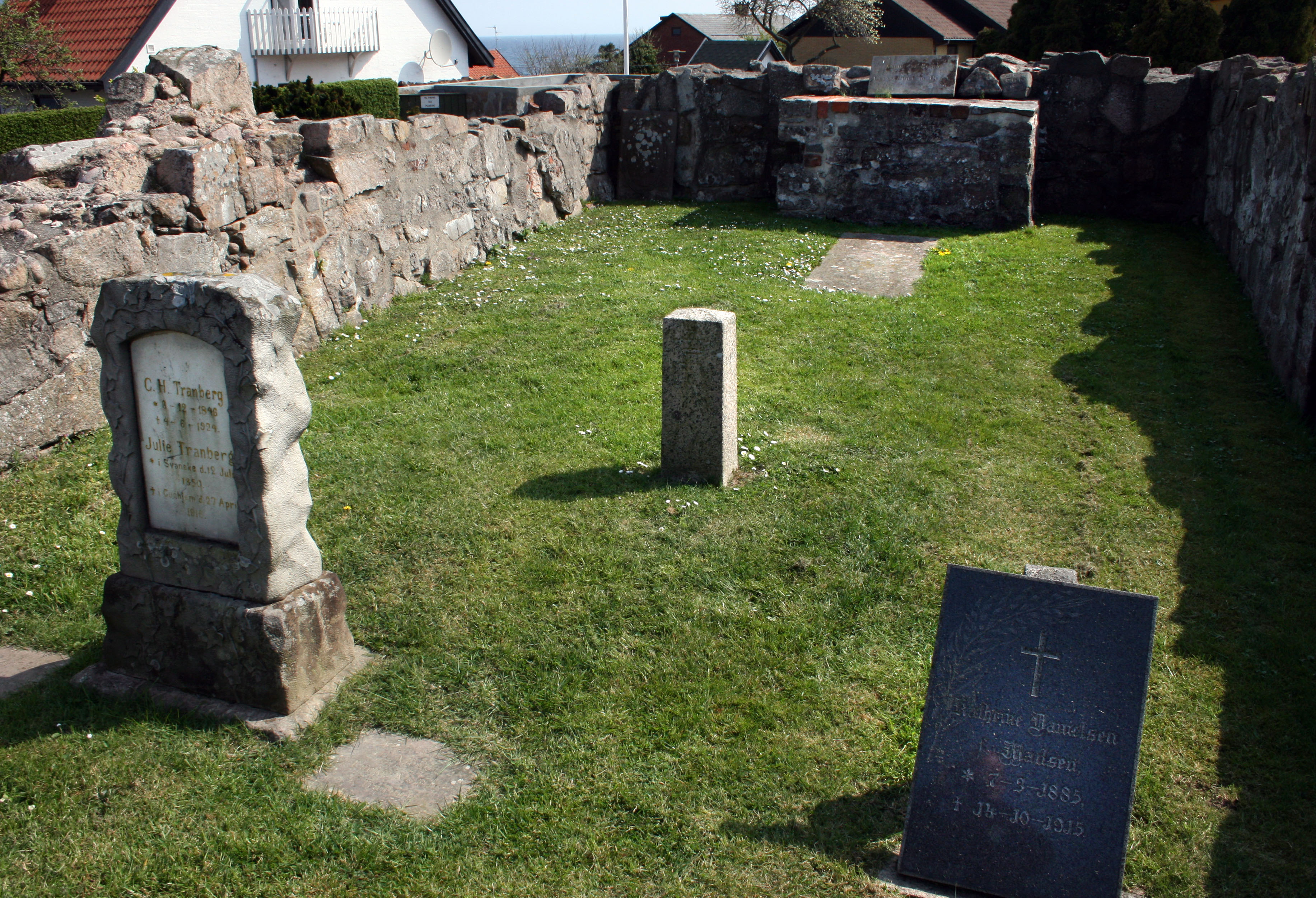 Skt. Anna kapel tæt på Gudhjem Kirke